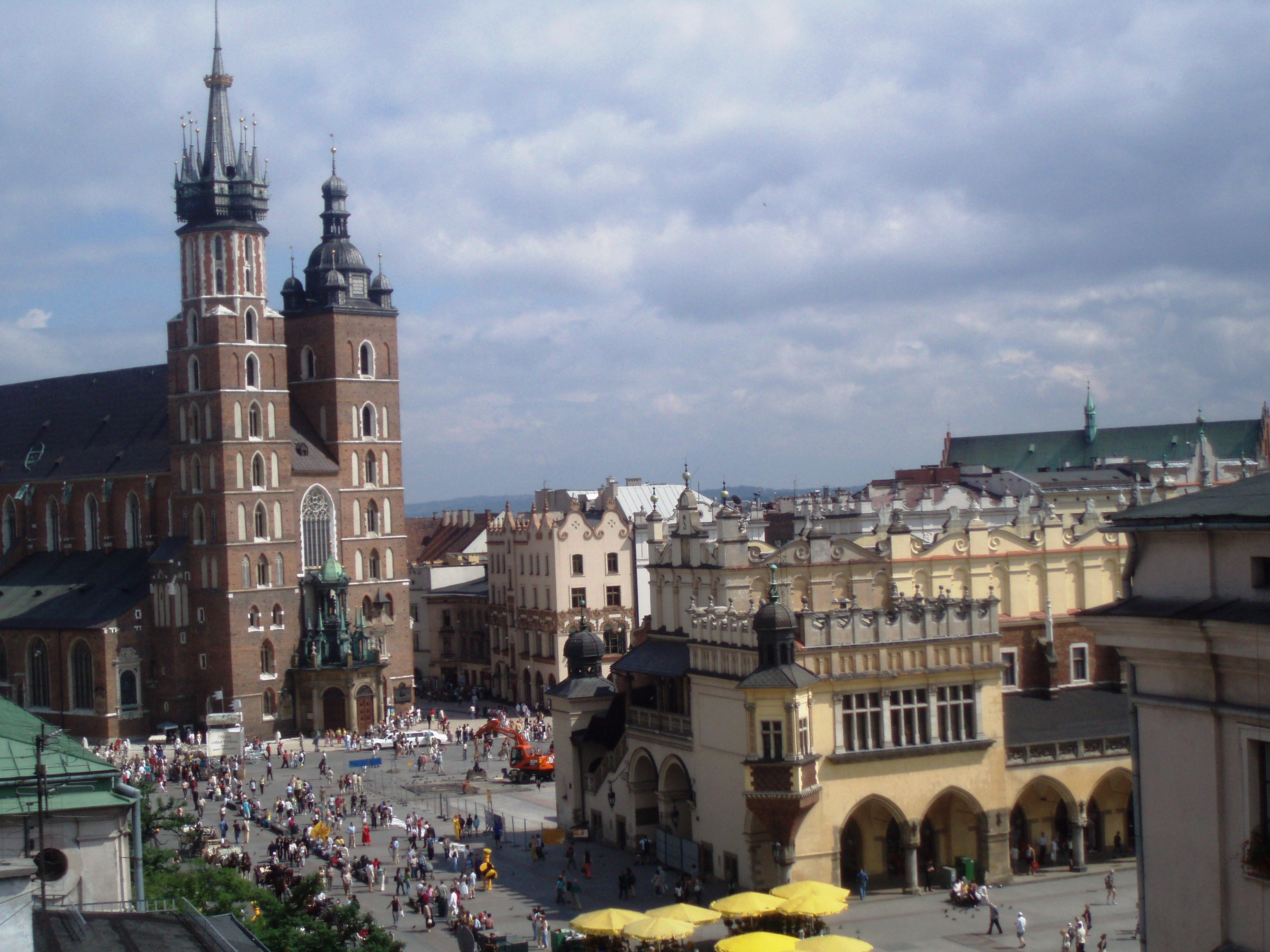 Kraków (Rynek), Poland